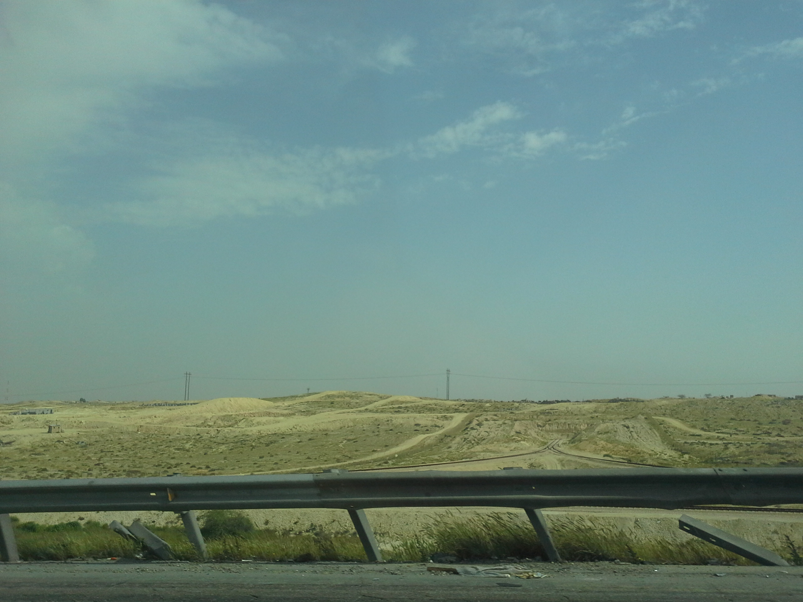 Hajar, Dhahran Saudi Arabia